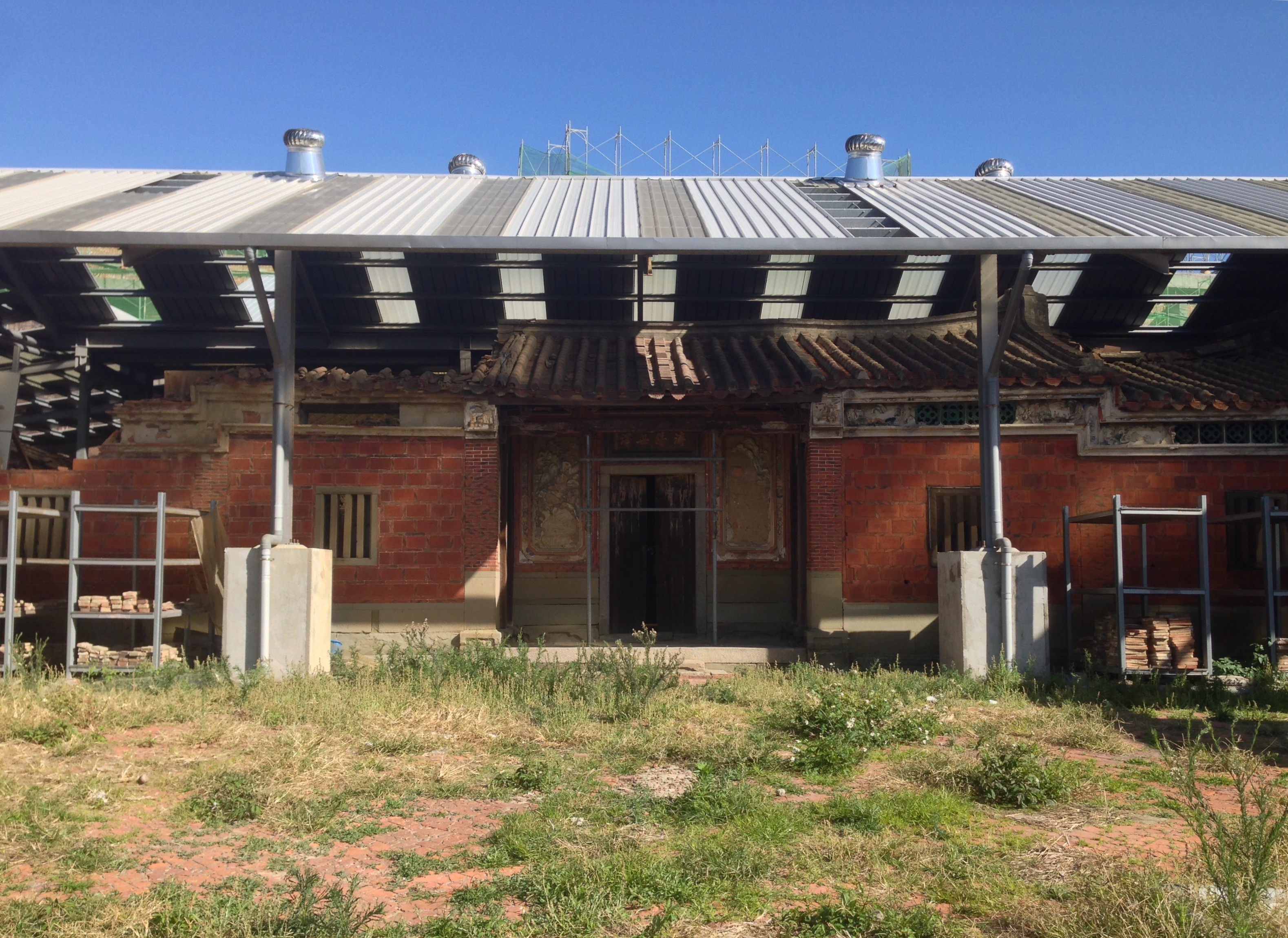 中文（台灣）: 山腳蔡氏濟陽堂